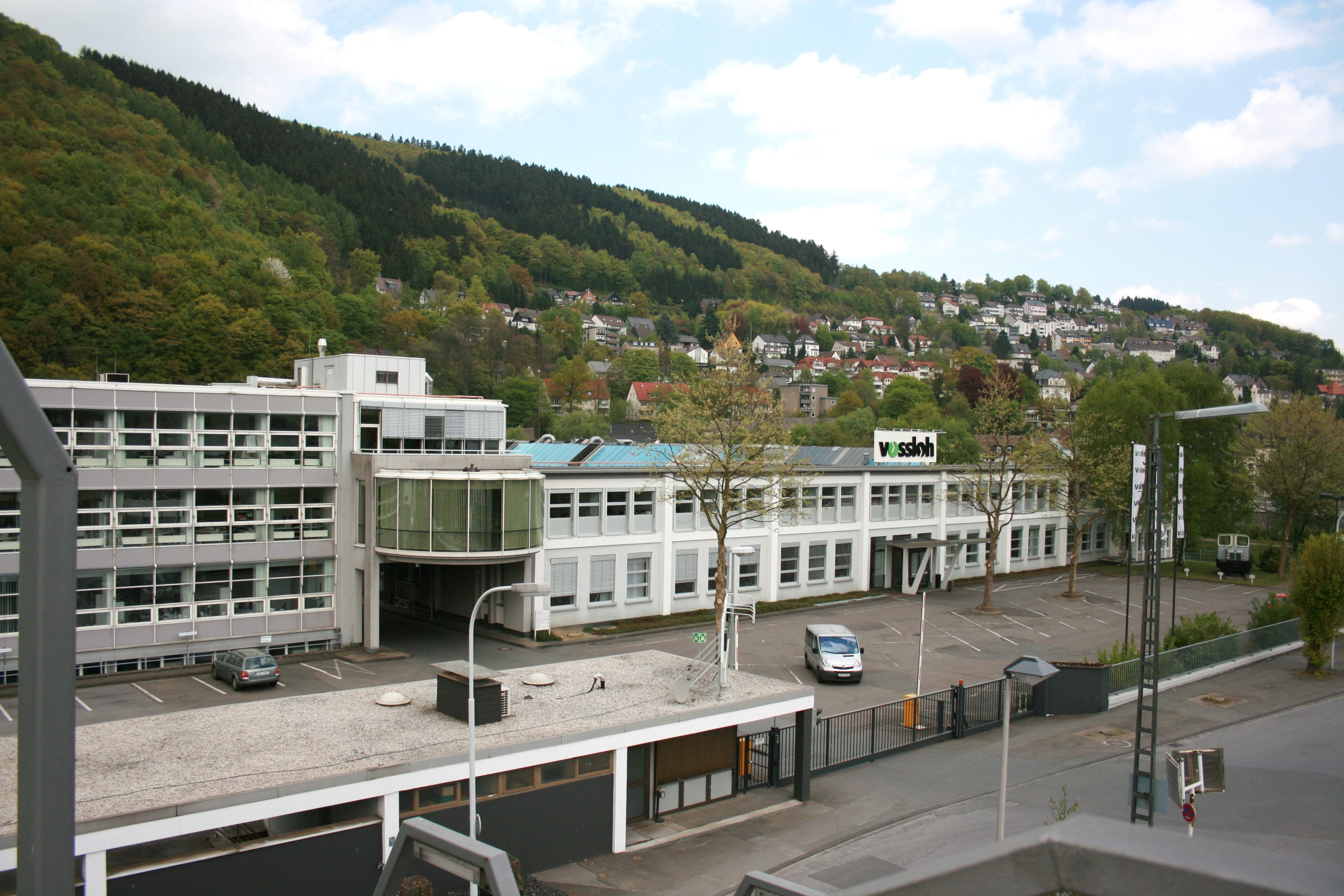 Vossloh, Blick von der Bahnhofsbrücke in Werdohl